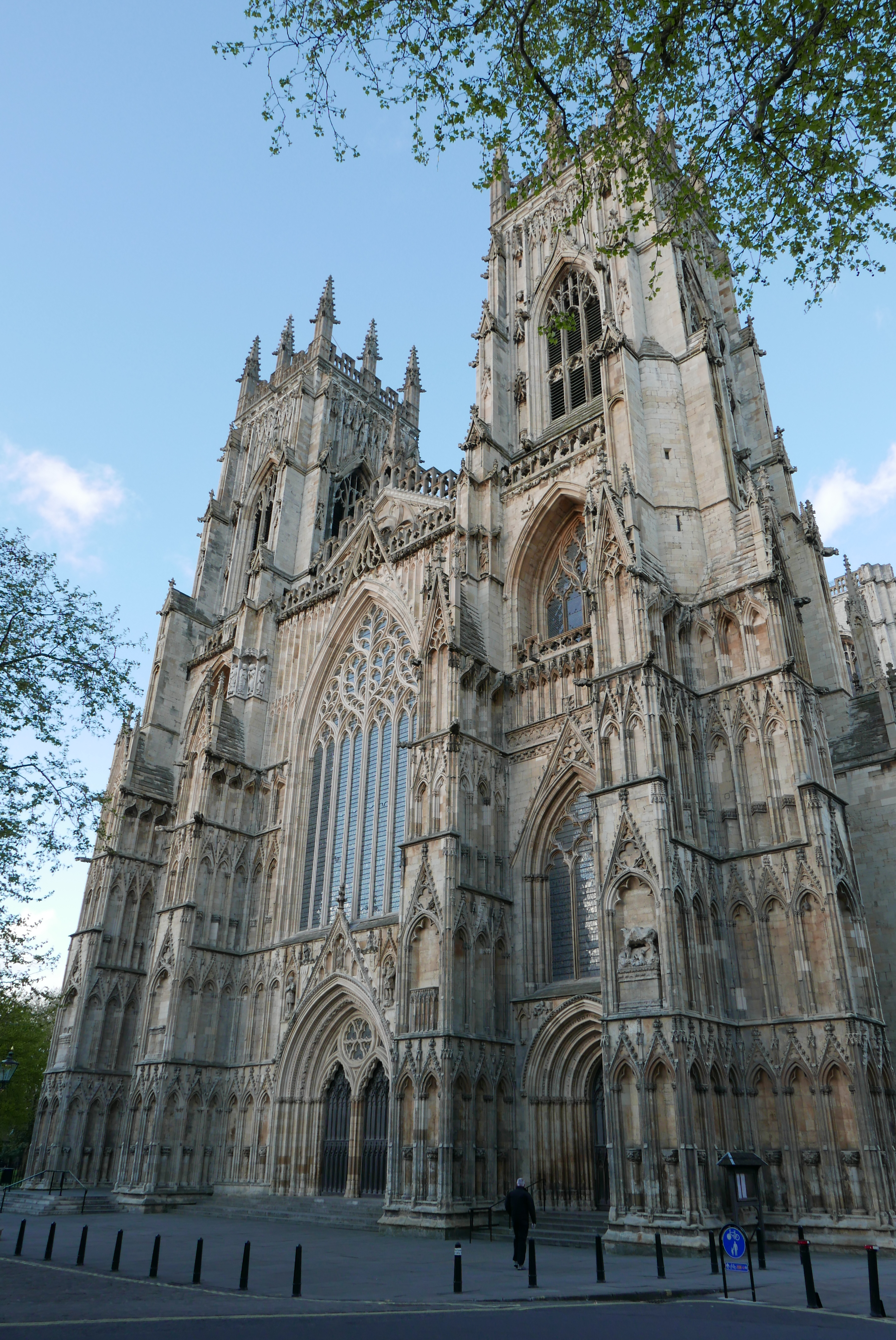 Façade avant de la Cathédrale de York